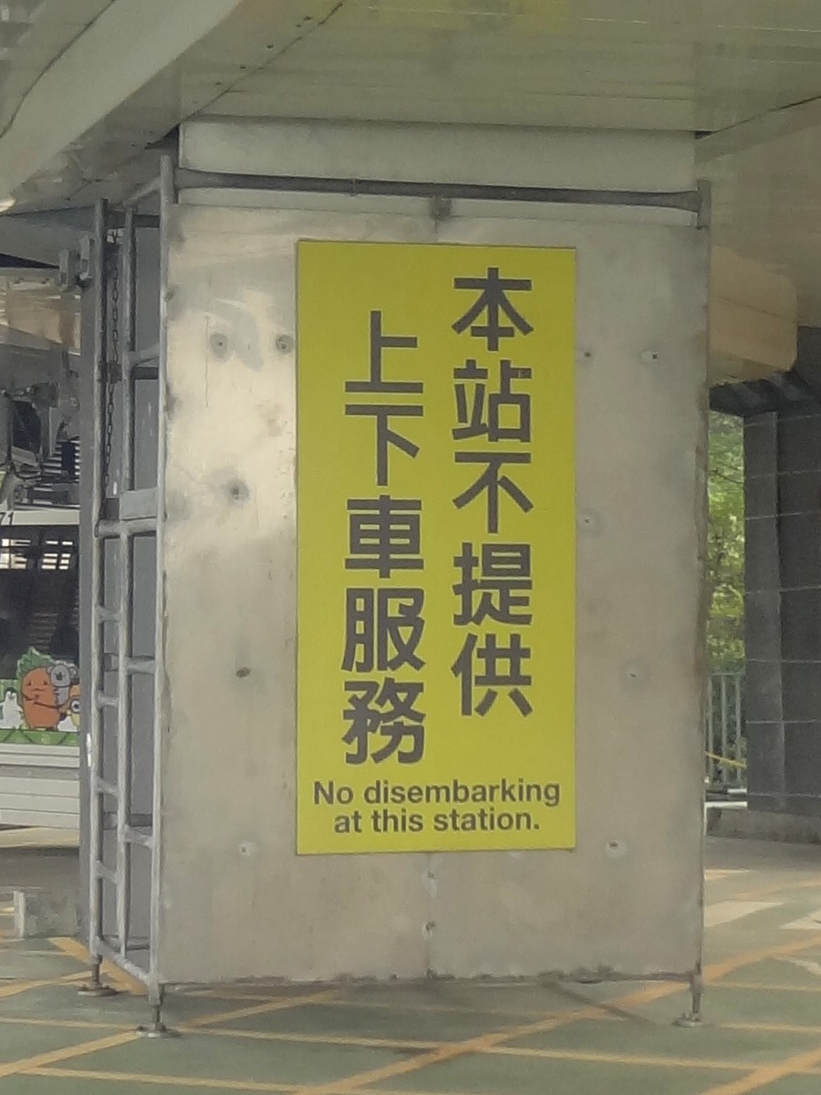 中文（台灣）: 貓空纜車轉角站的「本站不提供上下車服務」標示牌。